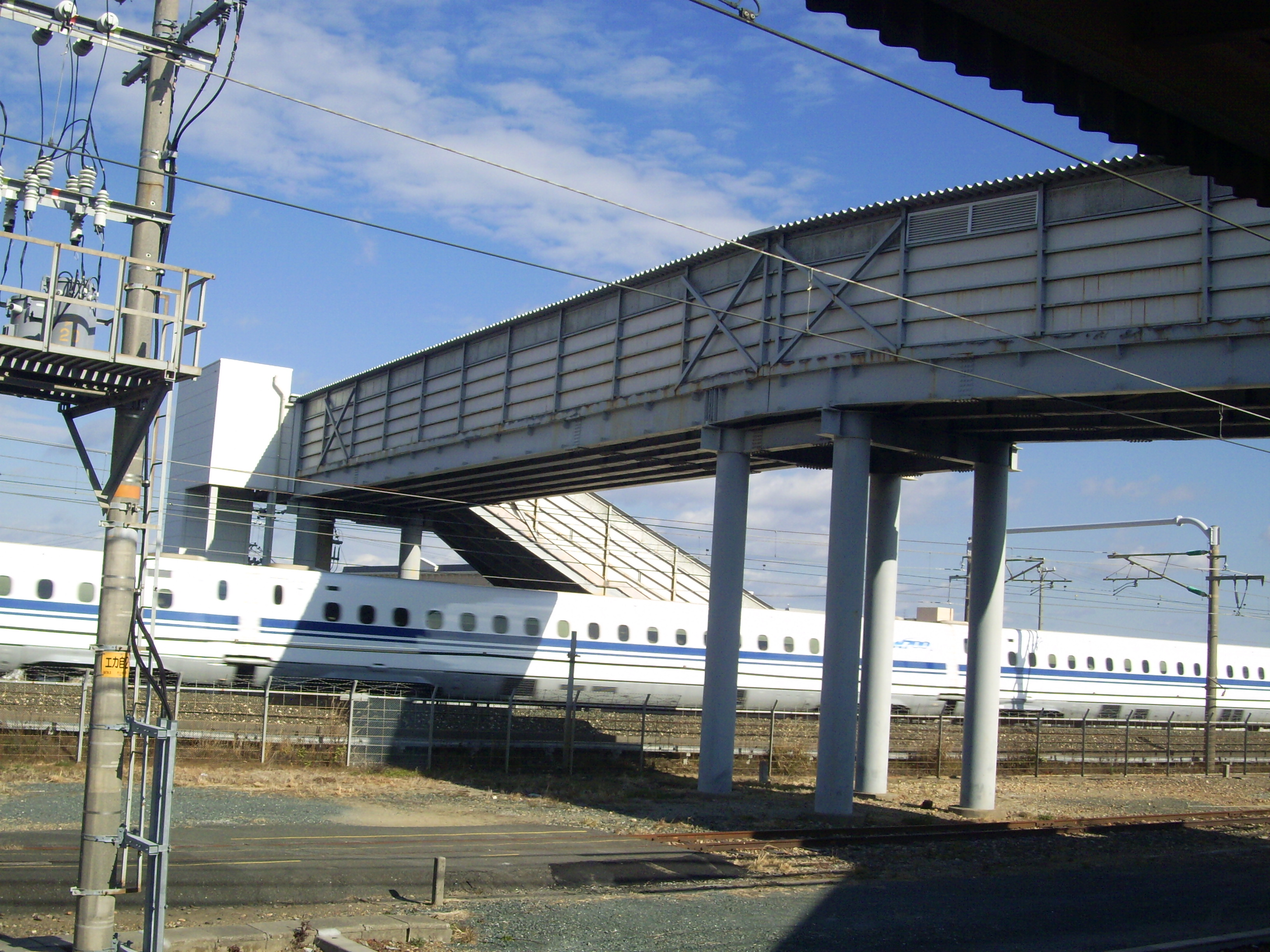 東海道新幹線軌道を跨ぐ東海道本線新居町駅の競艇場臨時改札へ至る連絡橋 ㊟カメラを起動すると日付機能が出荷時のものに初期化されるため、ファイル履歴の投稿日時とメタデータの原画像データの生成日時が異なります（本概要欄の下記日付が撮影日）